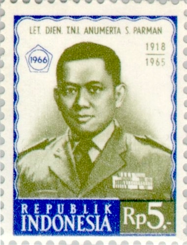 Siswondo Parman